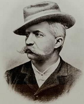 Un ritratto di Felice Cavallotti alla fine del XIX secolo